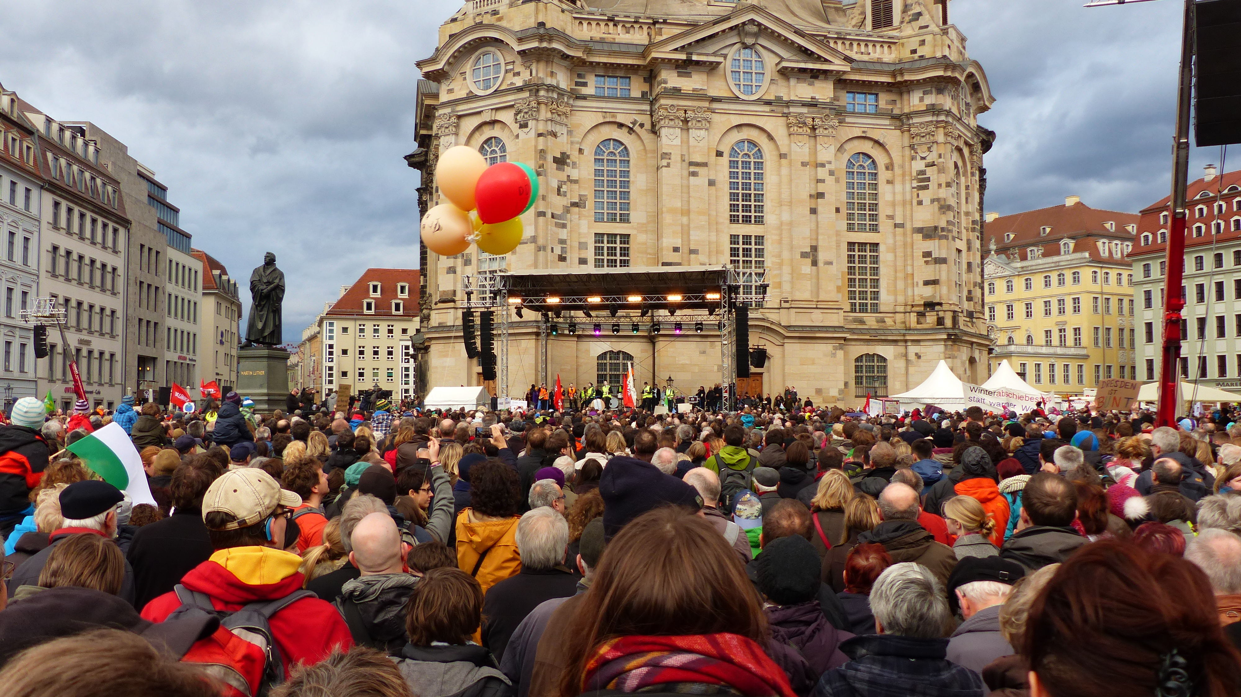 Kundgebung für Weltoffenheit, Mitmenschlichkeit und Dialog im Miteinander am 10. Januar 2015 auf dem Neumarkt vor der Frauenkirche in Dresden (Anti-Pegida)